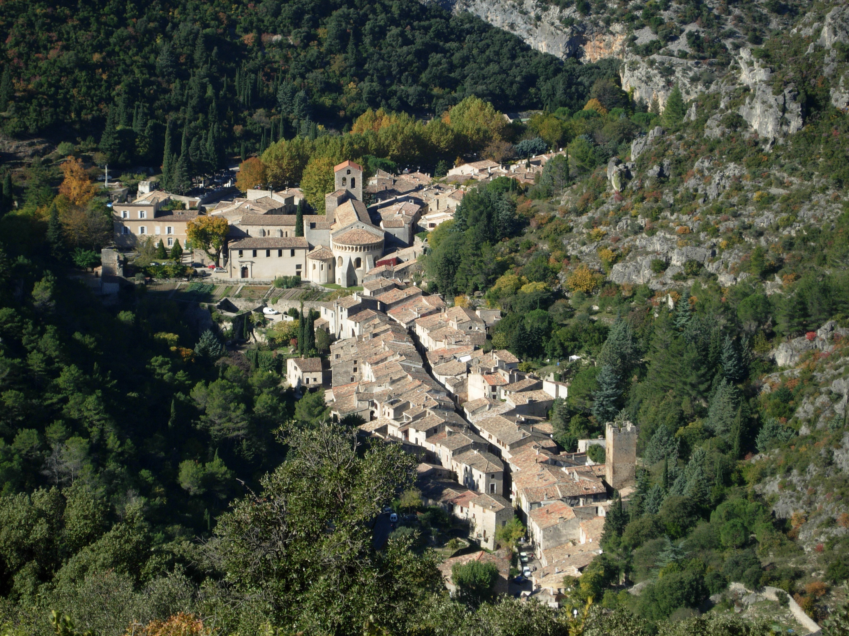 Saint-Guilhem-le-Désert (Hérault) - Vue générale.